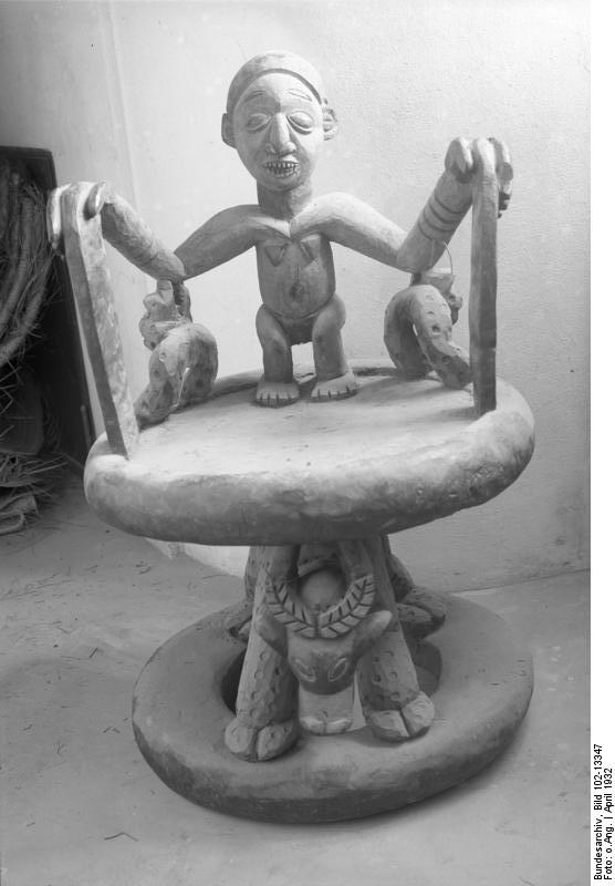 Eine interessante Neuerwerbung im Asiatischen Museum in Berlin ! Der Thronsessel eines Schwarzen Monarchen aus einem Baumstamm herausgeschnitzt.